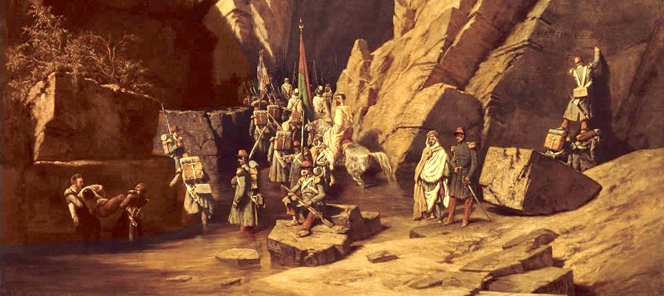 Passage des Portes de Fer, 1939, détail. Tableau d'Adrien Dauzats.